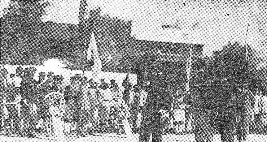 1923년 전국체육대회 야구(제4회 전조선야구대회) 개회식 모습.